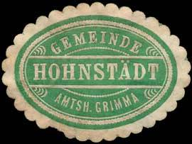 Sealing stamp Title: Gemeinde Hohnstädt - Amtshauptmannschaft Grimma Description: grün, weiß, geprägt Place: Hohnstädt size: 3x4 cm